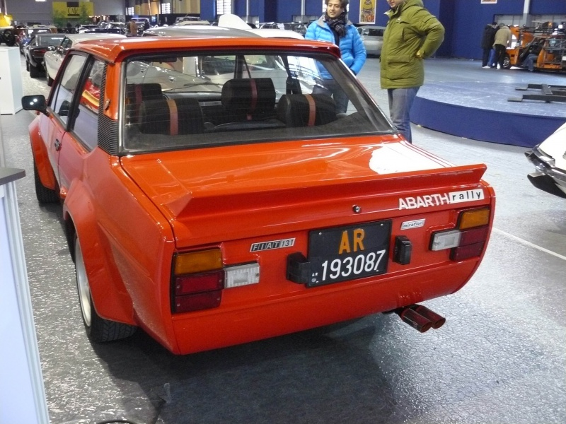 Retromobile 2012